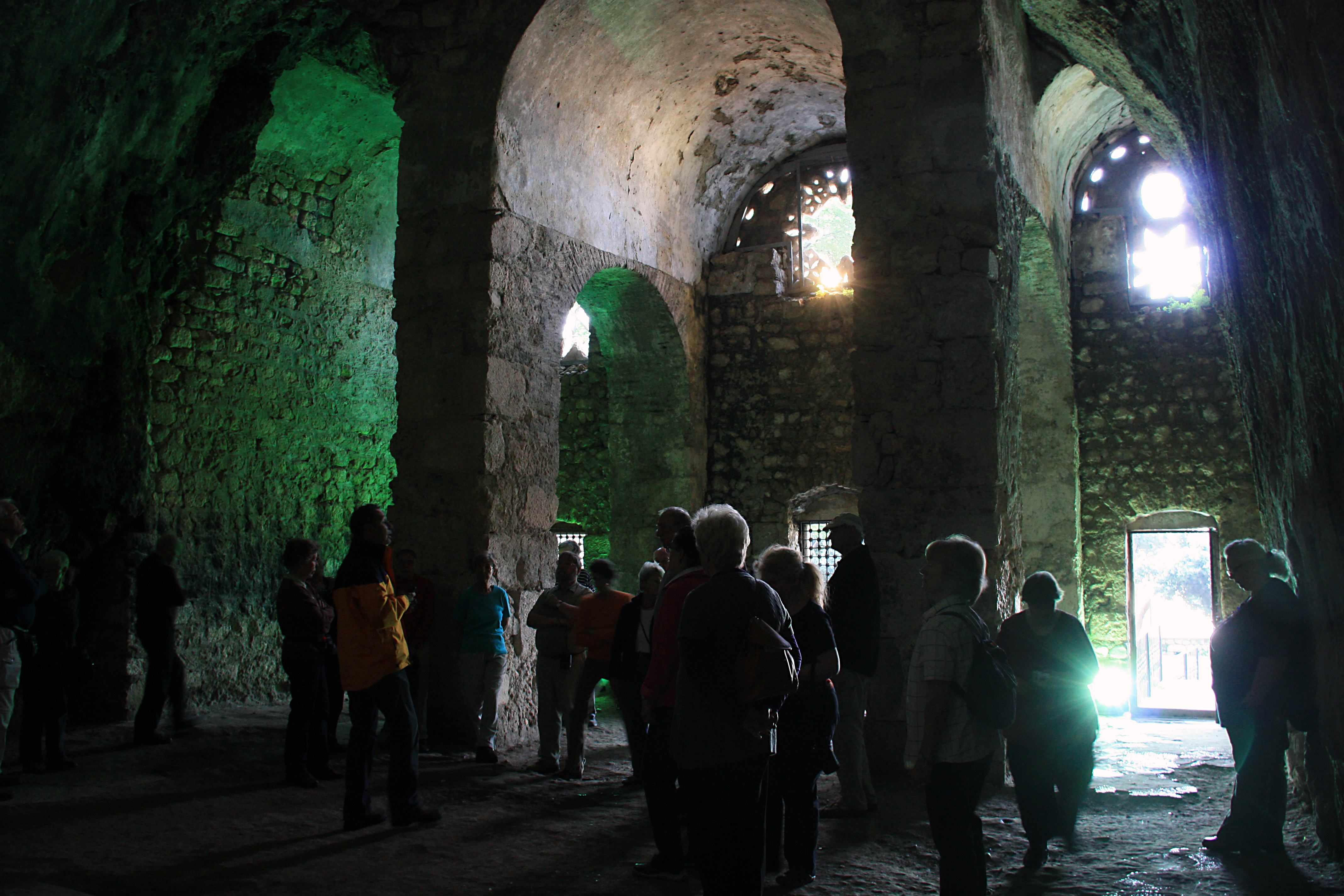 Innenaufnahme der Petrusgrotte in Antioachia/Antakya